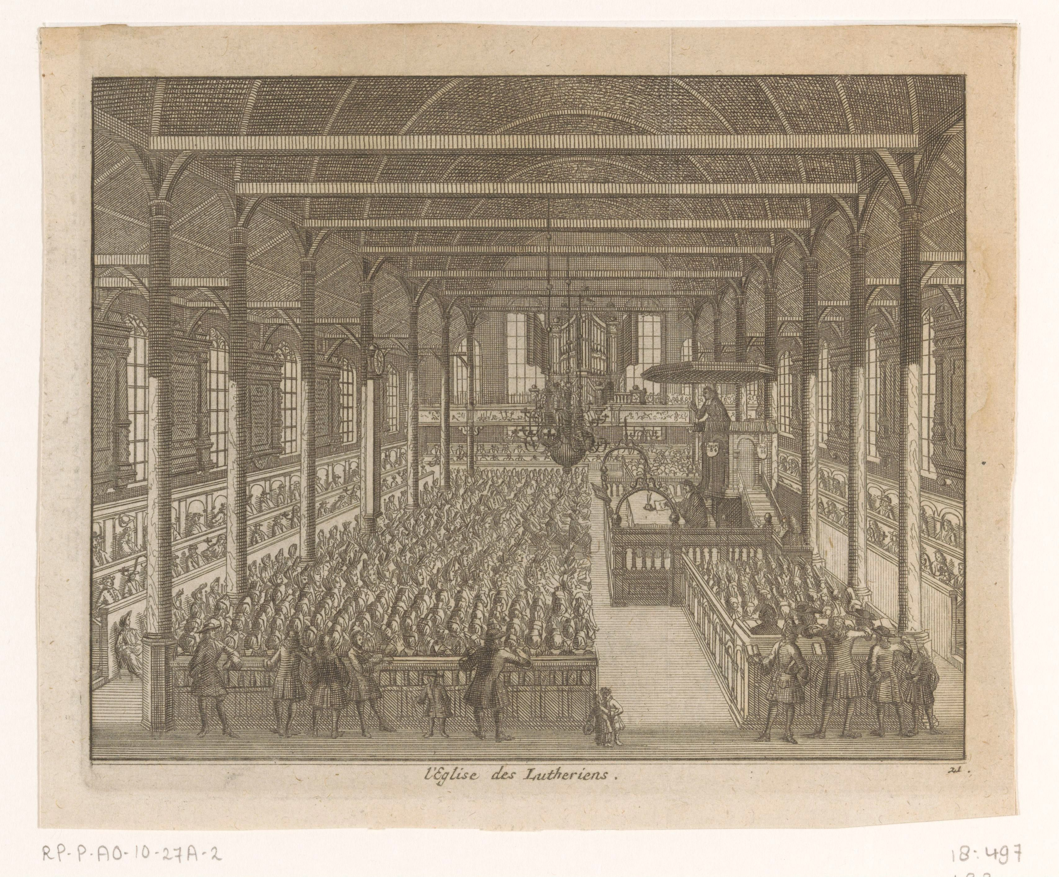 Interieur van de Lutherse Kerk te Leiden uit het boekje 'Les delices de Leyde' uit 1712